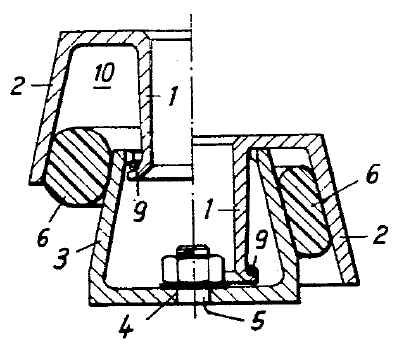 ナイトハルトゴムばねの直線動作タイプの例、円環状（ドーナツ状）のゴムを芯金、外筒の金具で挟み、ゴムを転がし圧縮することでばね作用を行う。